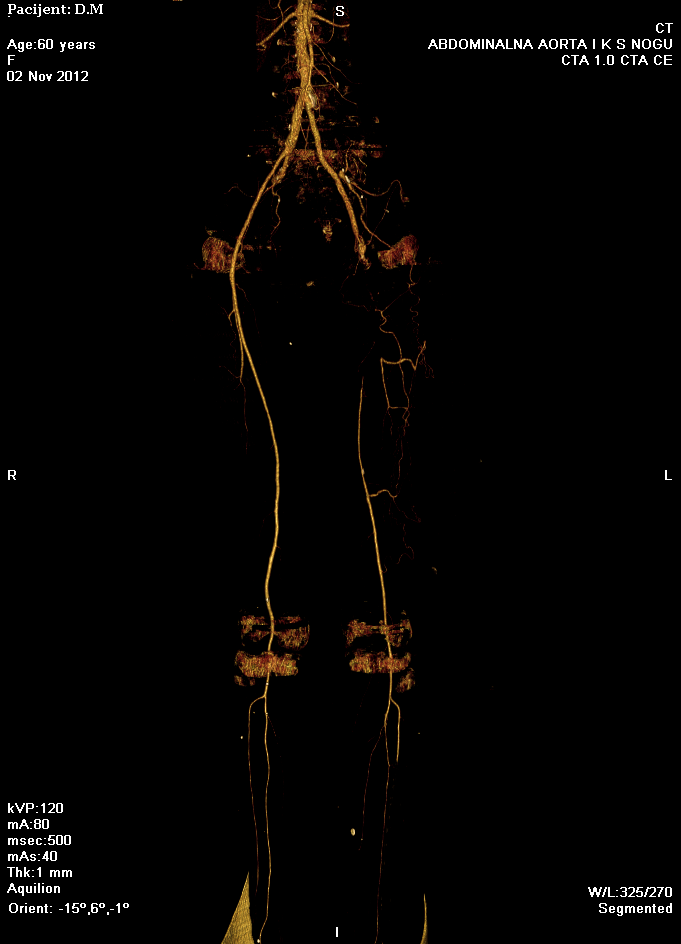 Srpski (latinica): Na presecima kroz završni deo abdominalne aorte i zajedničkih ilijačnih arterija uočava se da su kalcifikovanog zida, bez aneurizmatskih proširenja i znakova disekcije Leva AFS odmah nakon ostijuma okludirana i u nivou Hunterovog kanala se rekonstruiše iz dobro razvijenih kolaterala iz AFP. Poplitealne aarterije i njihove grane se dobro prikazuju uz redukovanu kapilarnu mrežu. Leva ADP okludirana na 15 cm od ostijuma Autor Milorad Dimić MD, Niš, 20.11.2012